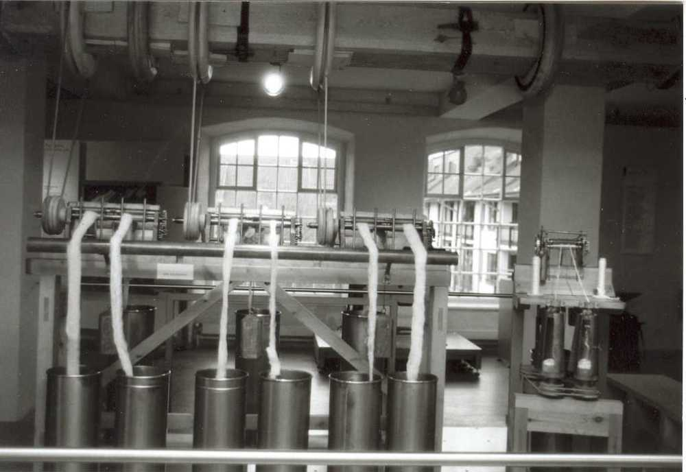 Eine Streckbank im Rheinisches Industriemuseum